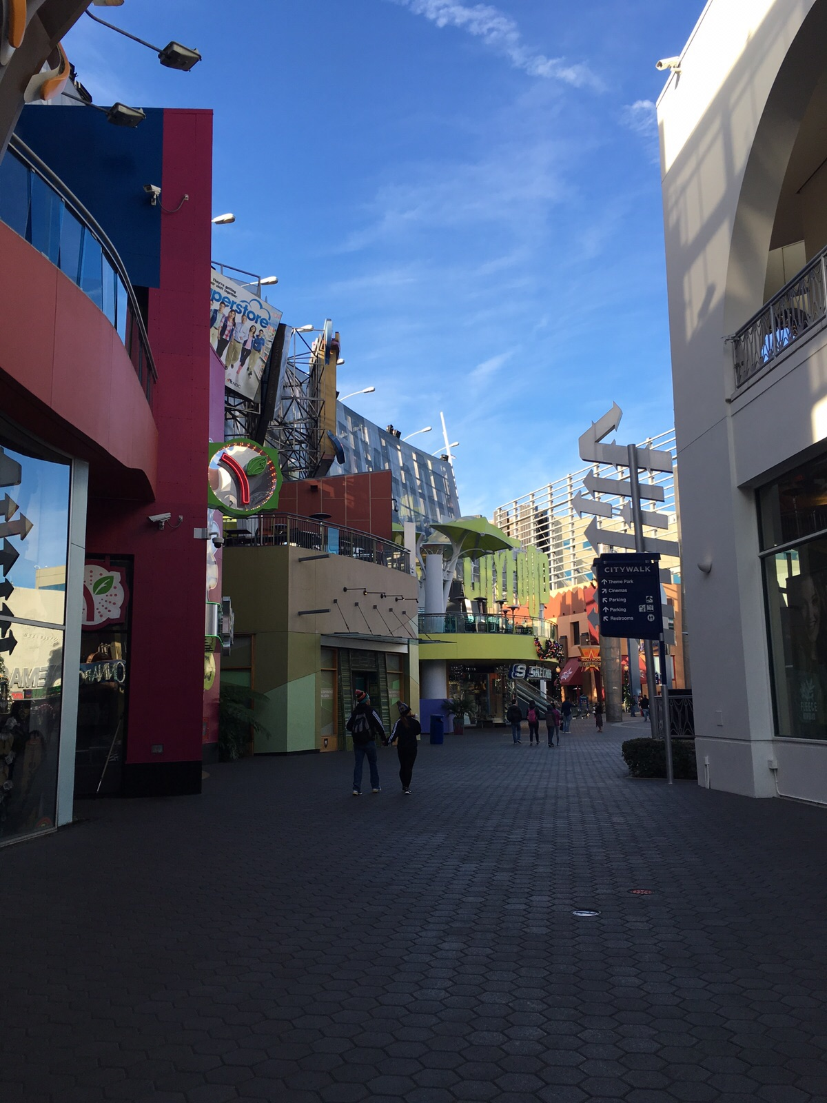 אולפני יוניברסל